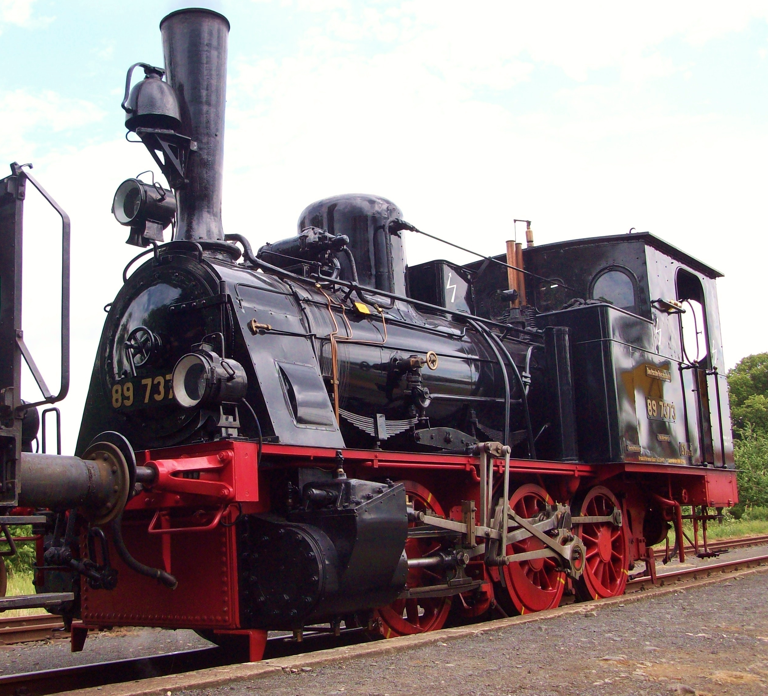 Rhönzügle: Die neu aufgebaute 89 7373, eine preußische T3, vor Dienstantritt in Fladungen, angekoppelt